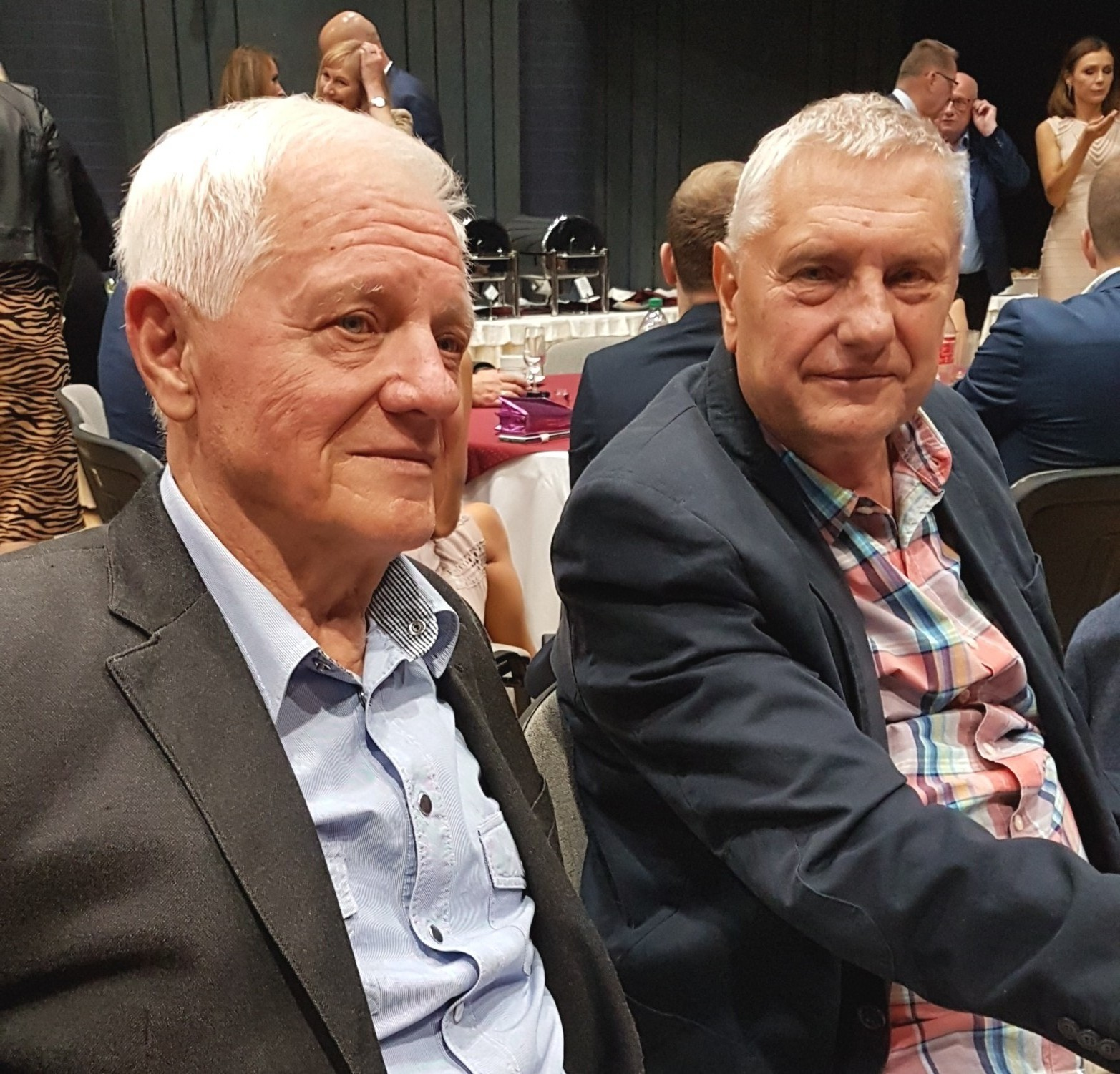 Stargardzka gala, 70-lecie